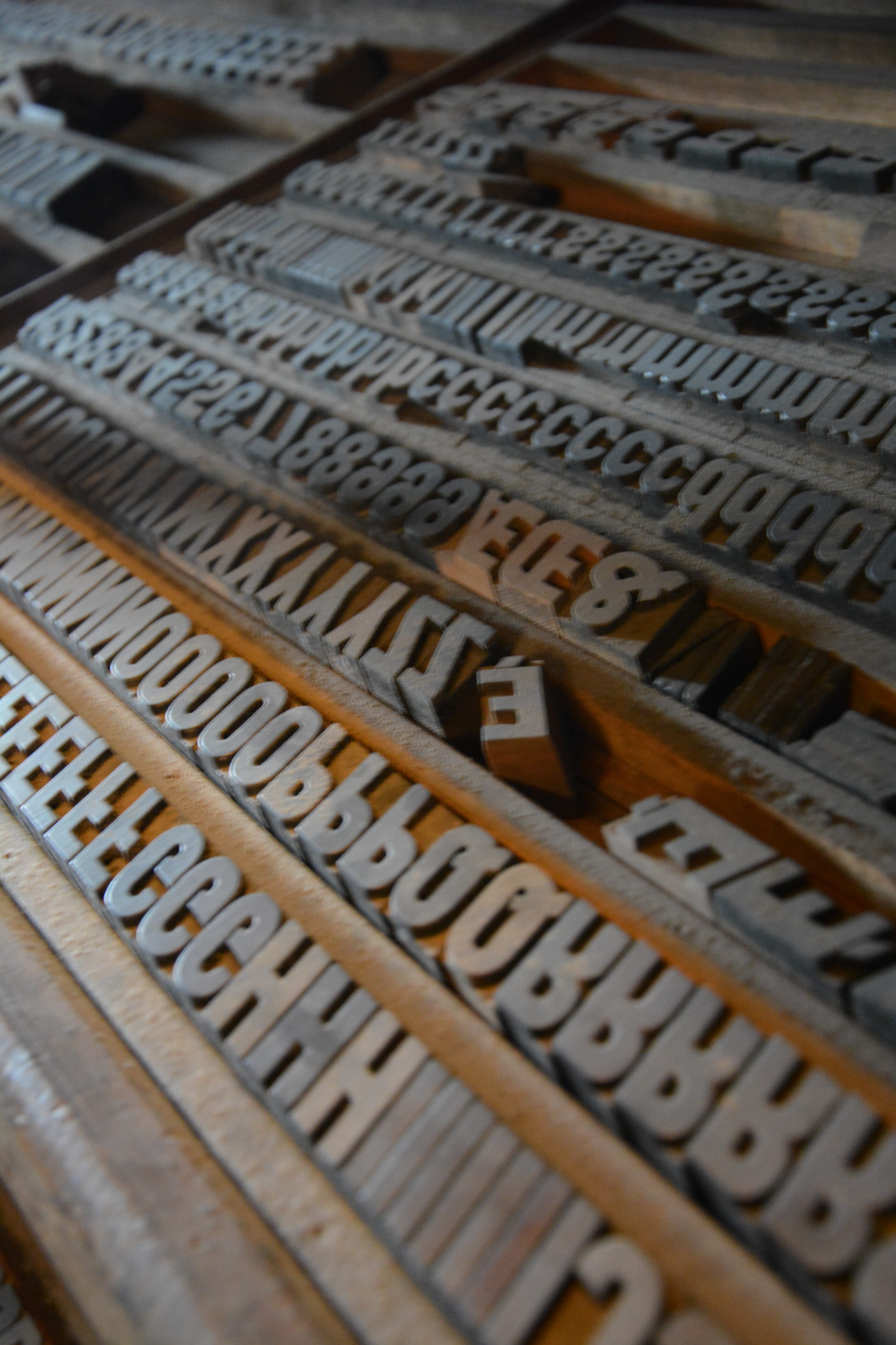 Type en métal à l'imprimerie PAM, Brest